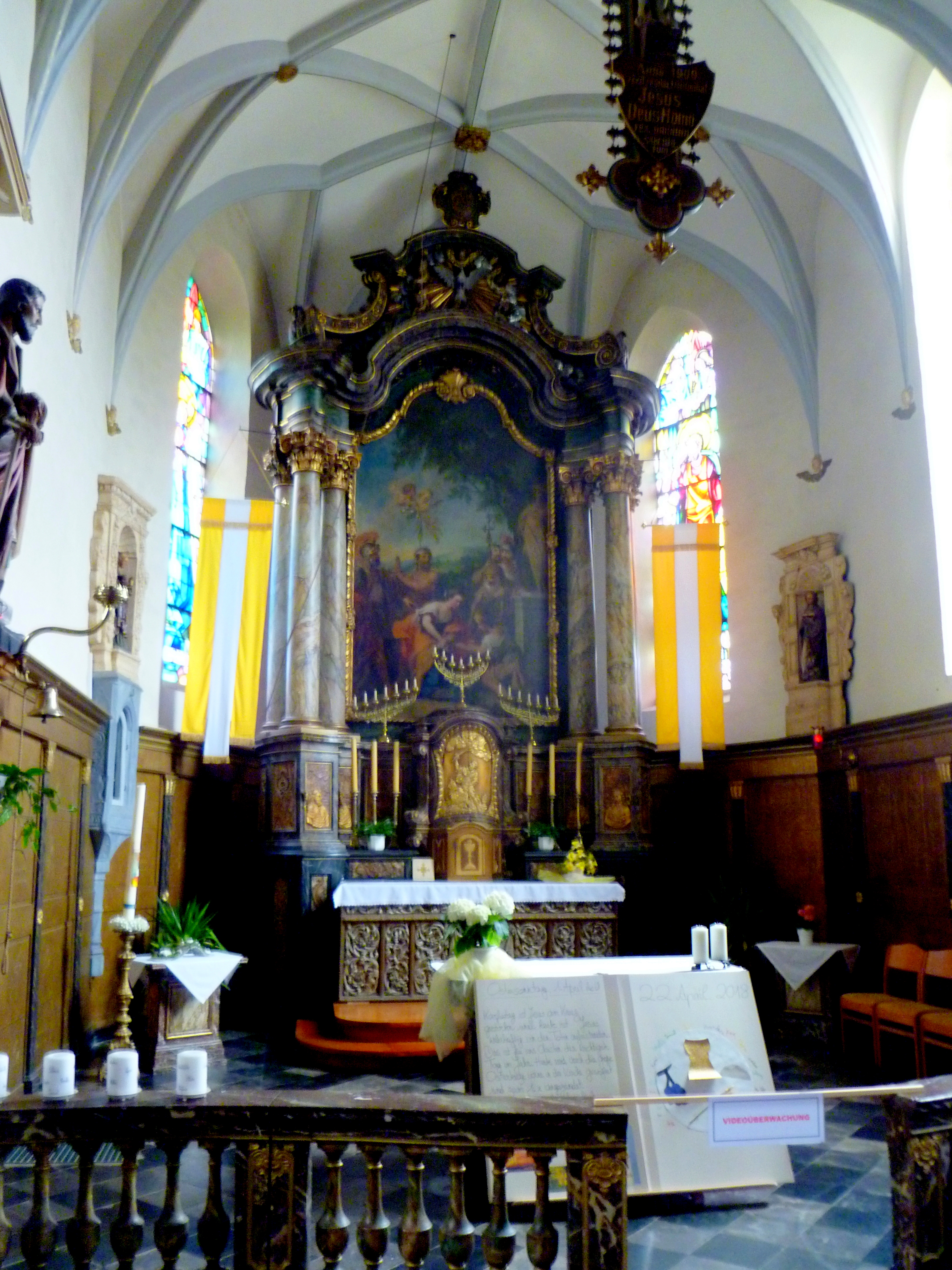 Altarraum St. Katharina in Kettenis bei Eupen; Hochaltar von Johann joseph Couven